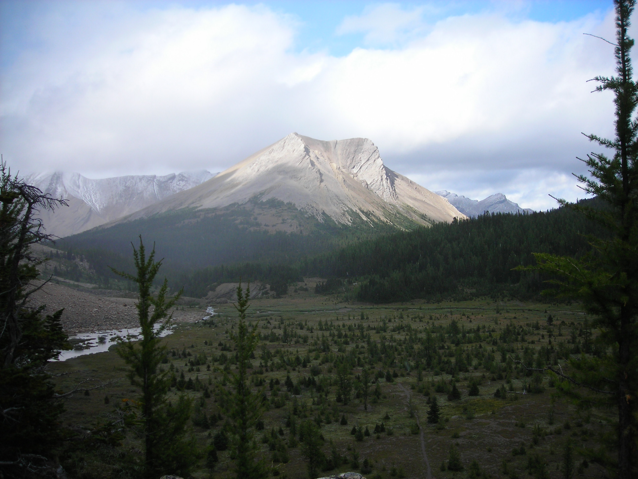 Skoki Mountain in Banff National Park, Alberta, Canada